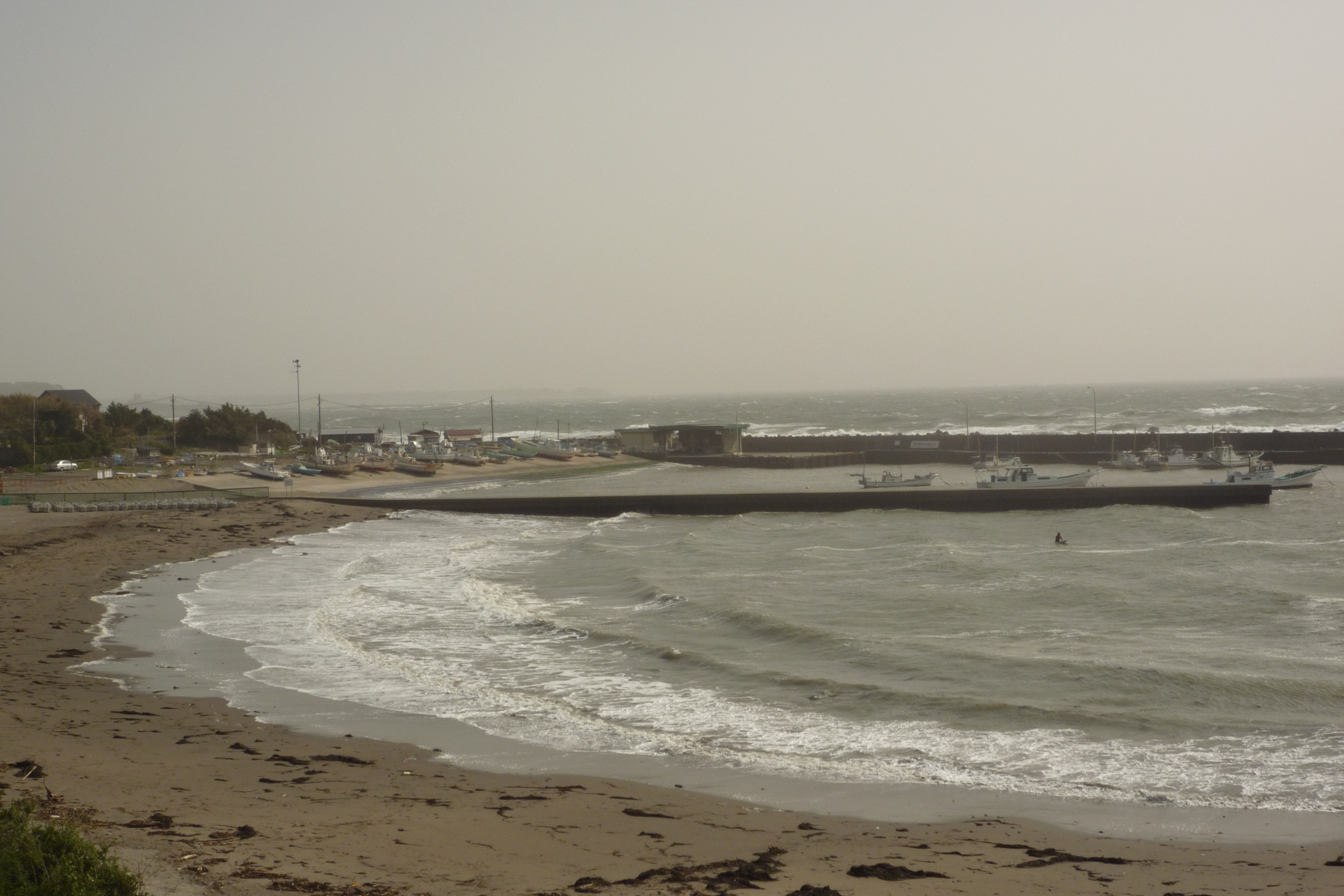 久留和漁港の画像。